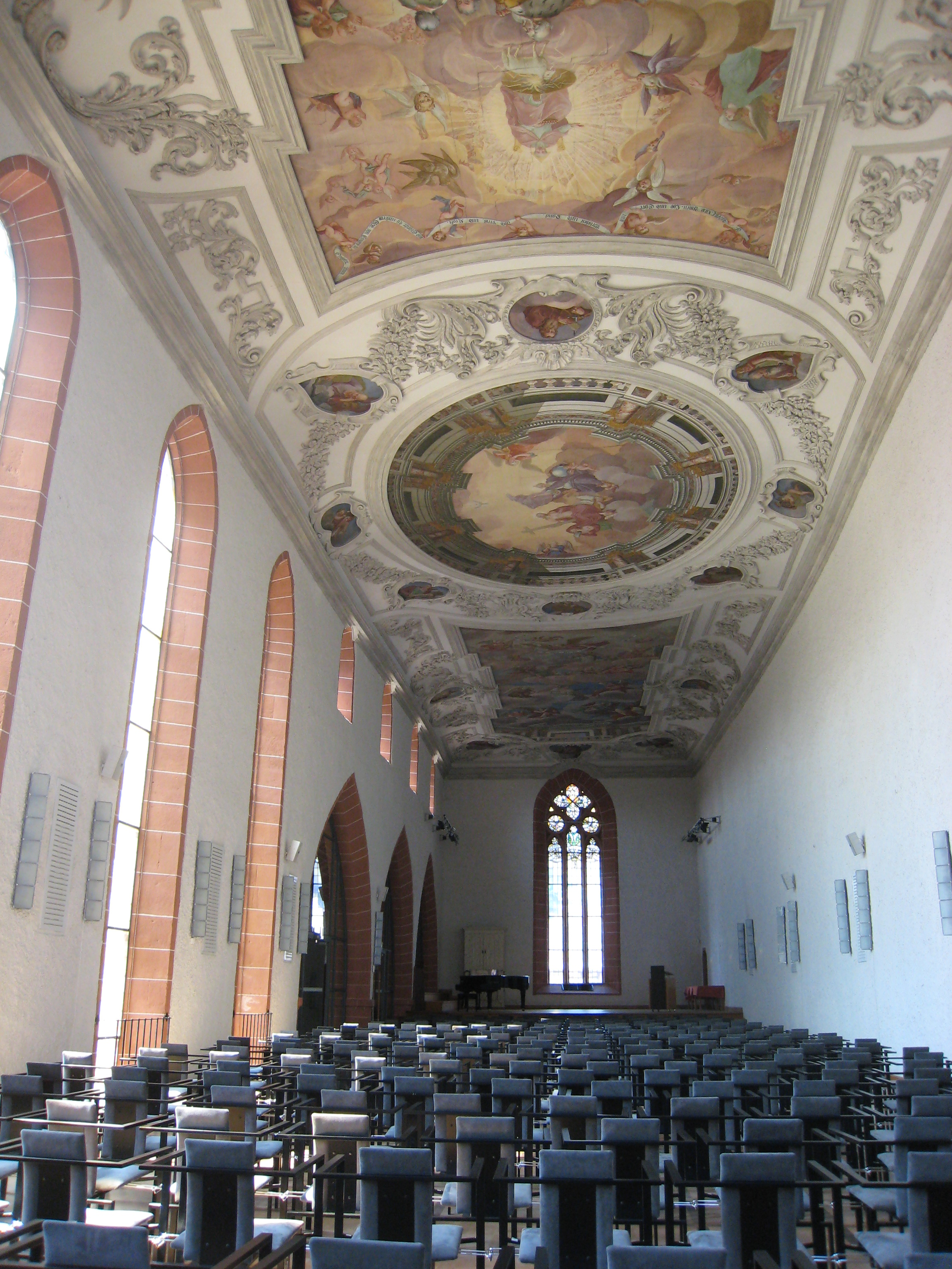 Ehemalige Franziskanerkirche in Saalfeld